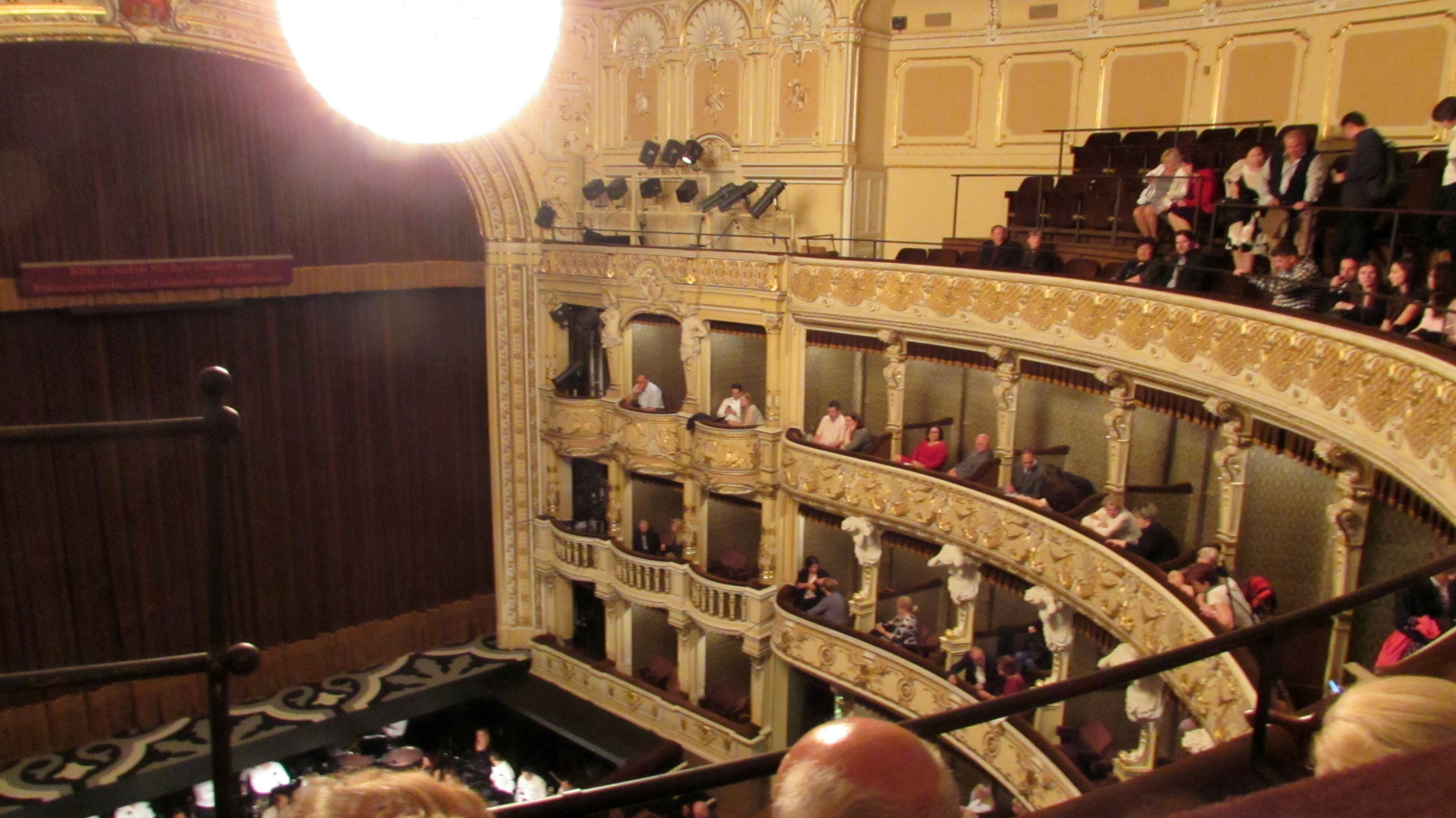 BratislavaAlteOperInnen